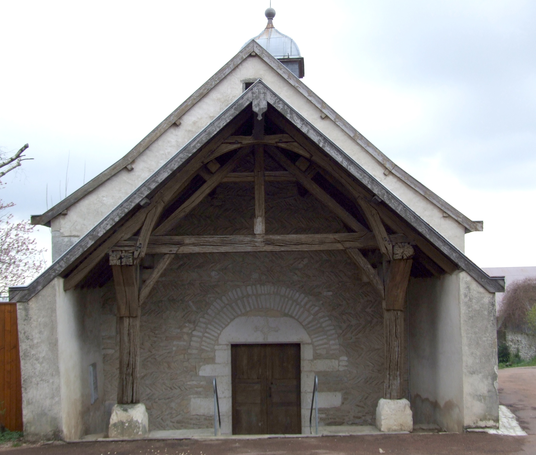 Façade romane de l'église Saint-Pierre,(fin du Xe, début du XIe siècle) appareil en arête-de-poisson , Hauteville-lès-Dijon, Côte-d'Or, Bourgogne,FRANCE